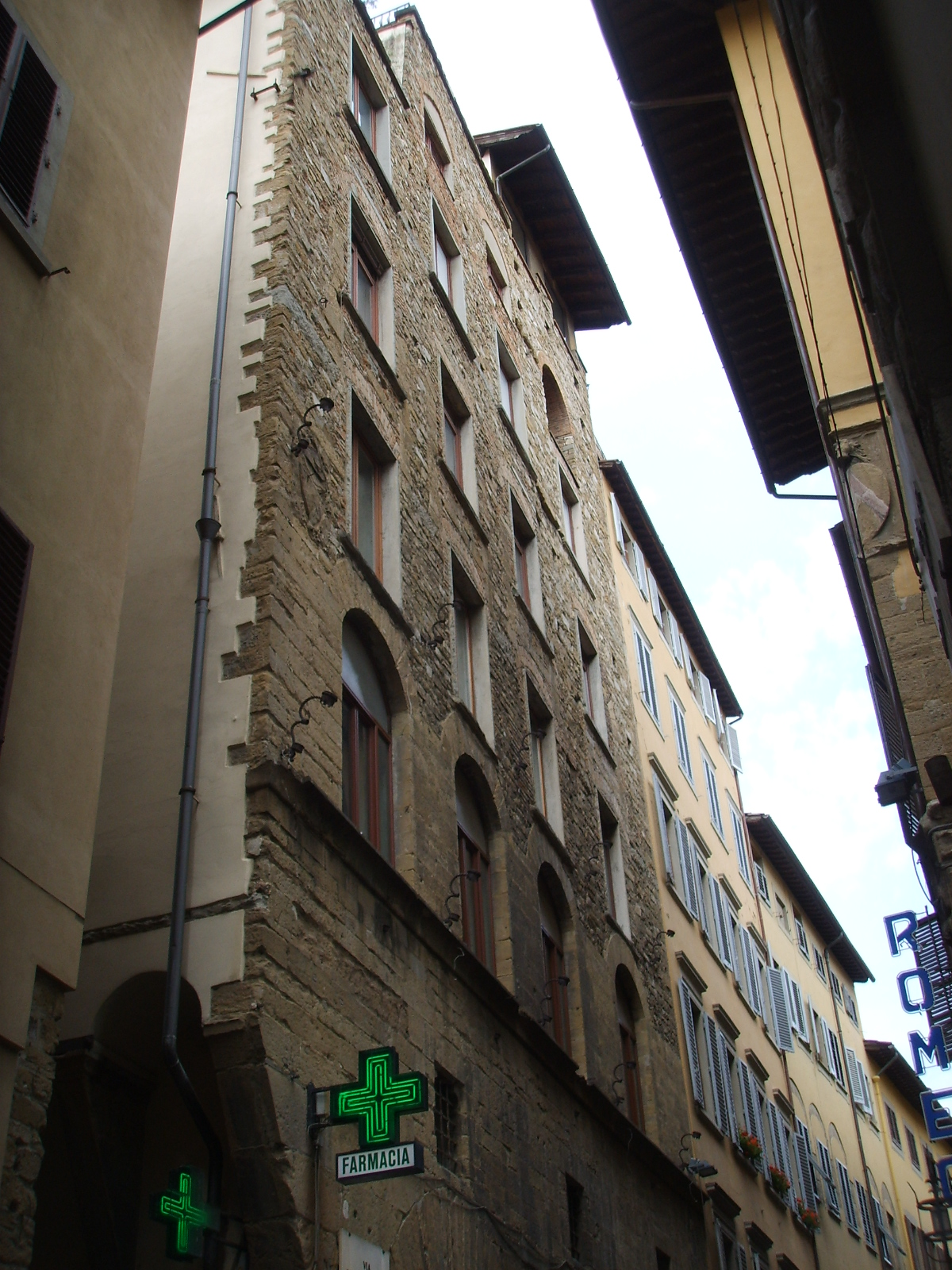 Palazzo via della condotta